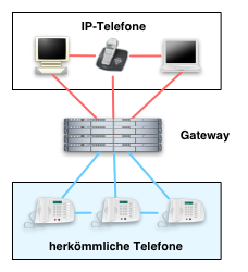 IP-Telefonie: Gateway